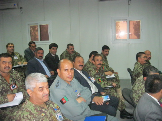 Stagiares afghans du cours SCSC